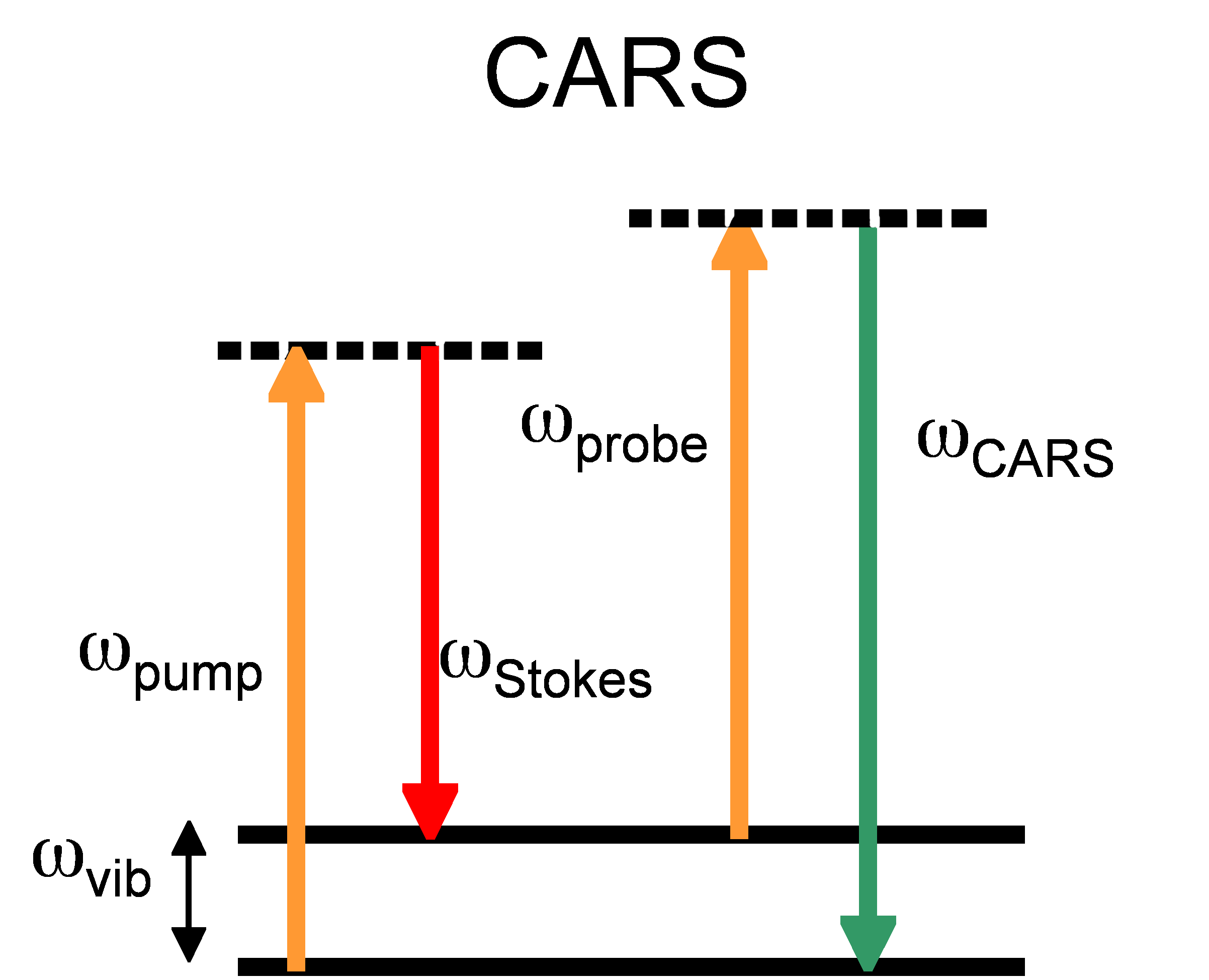 CARS energy diagram